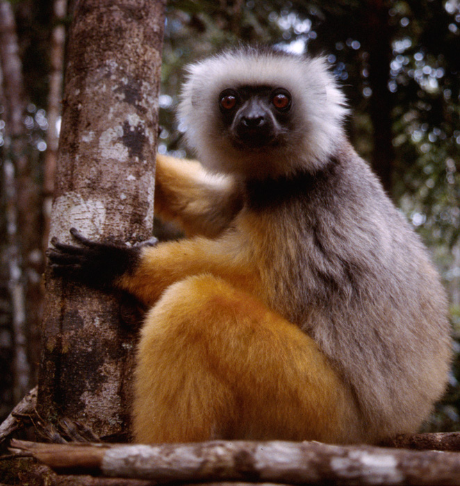 Diademed Sifaka (Propithecus diadema)